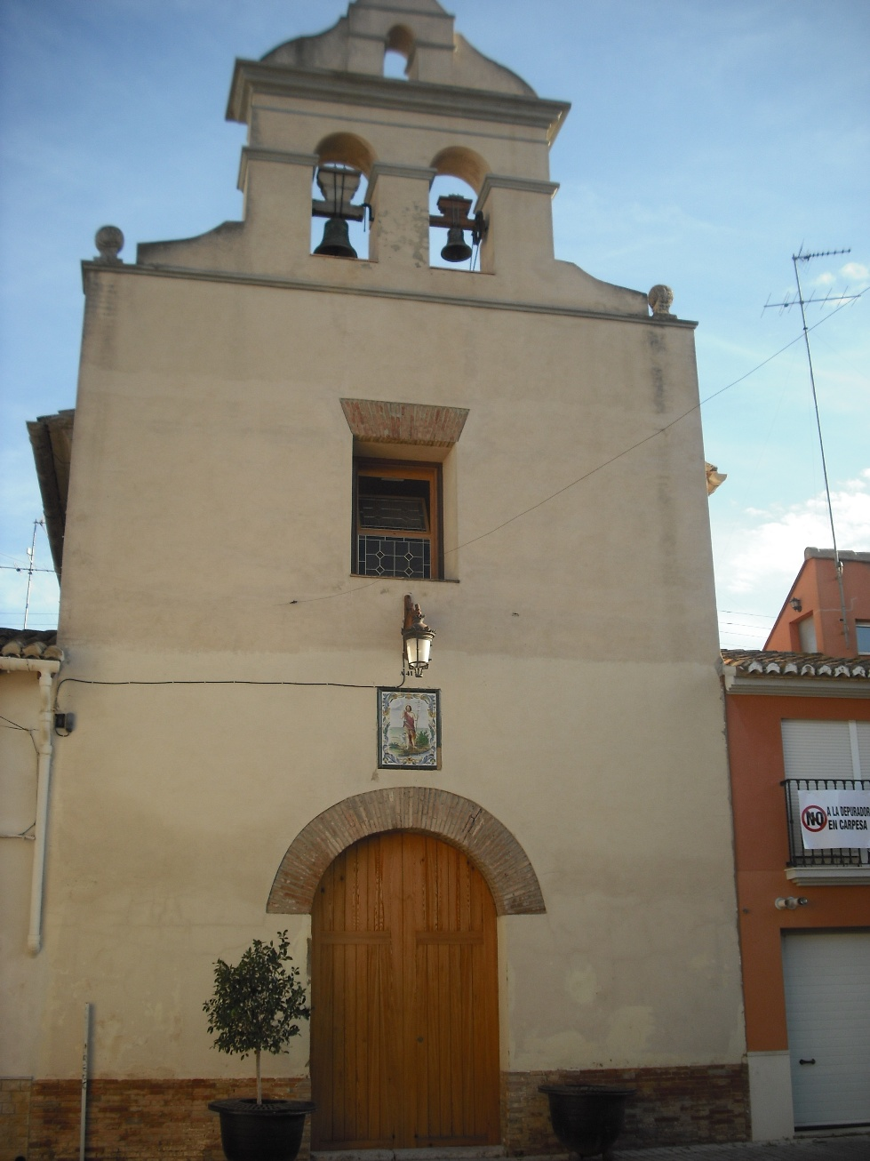 Ermita de Sant Joan de Bonrepós y Mirambell.